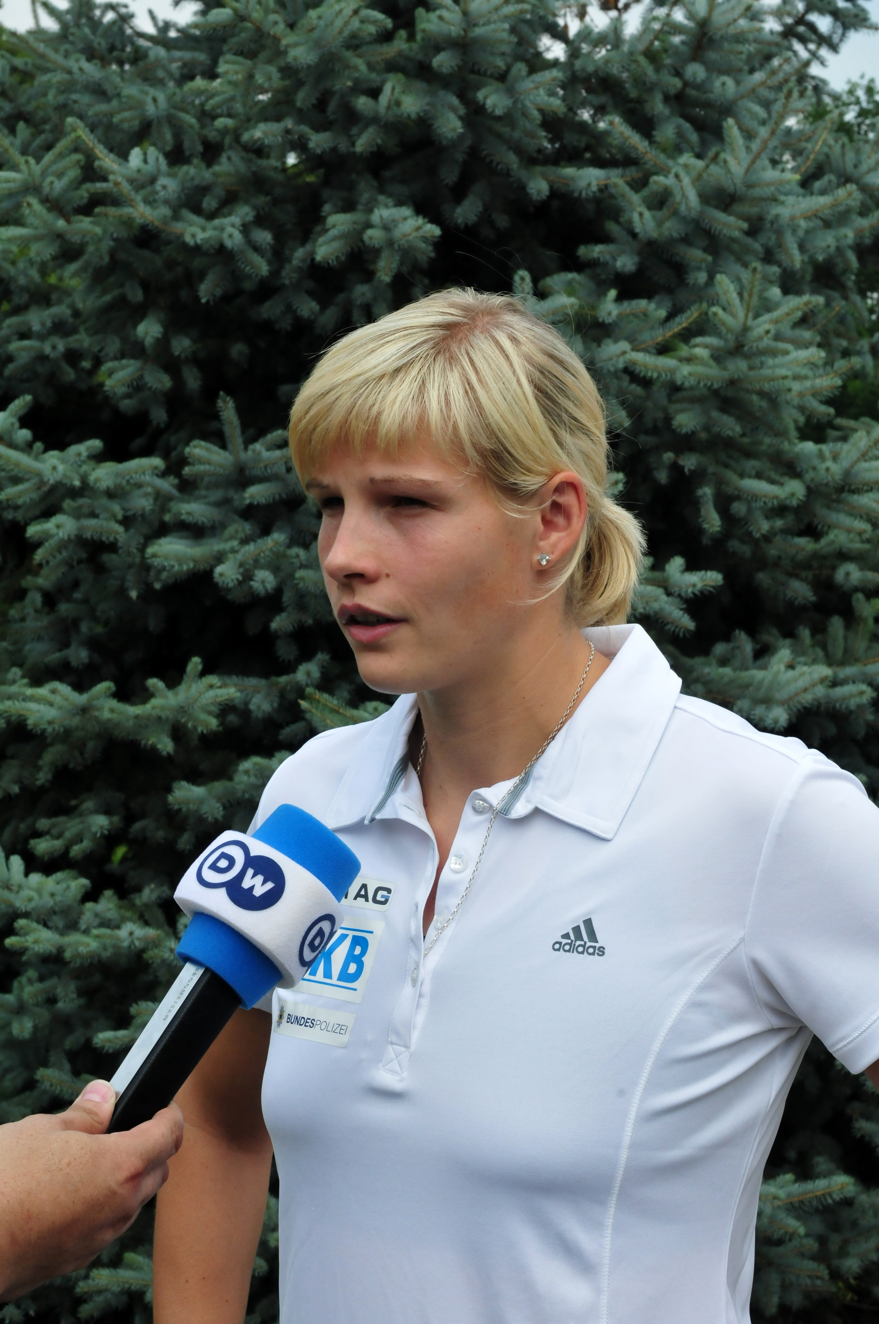 Pressetermin Olympiamannschaft in Kienbaum: Nadine Müller